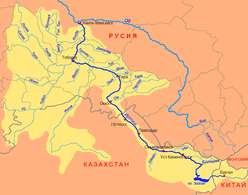 Басейнът на река Иртиш